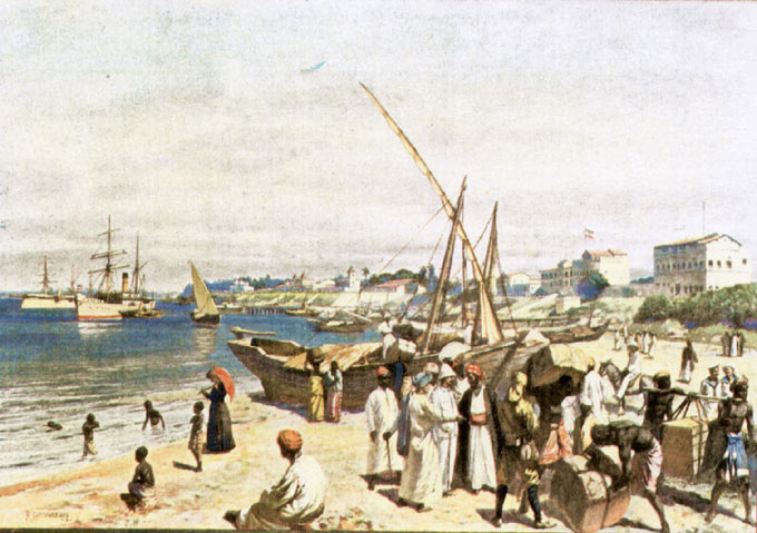 Dar-es-Salam